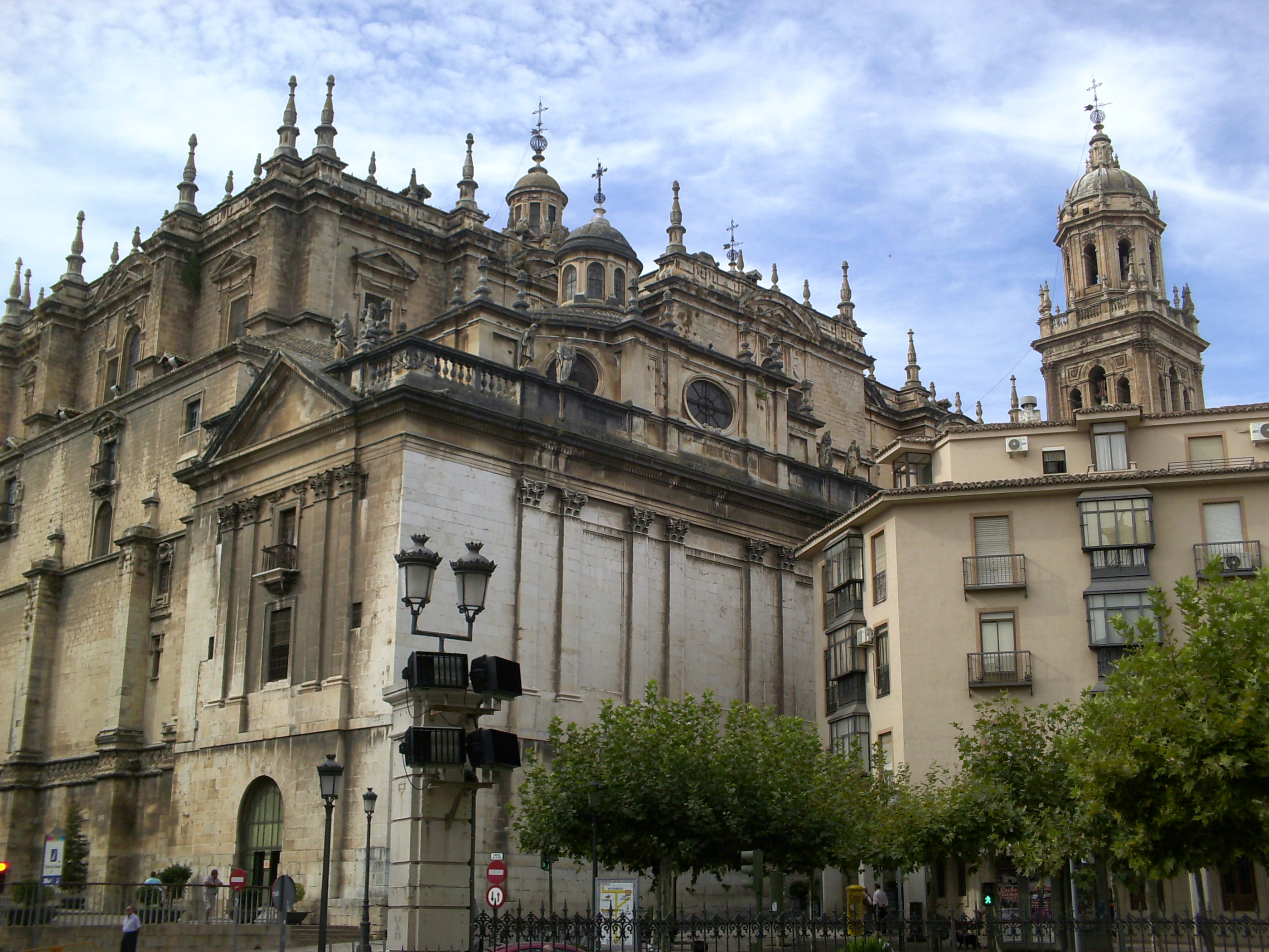 El Sagrario y la Catedral de Jaén desde la fachada de la Diputación Provincial.